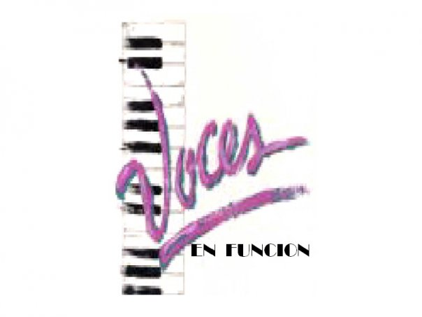 Foto digital de logo "Voces en Función"